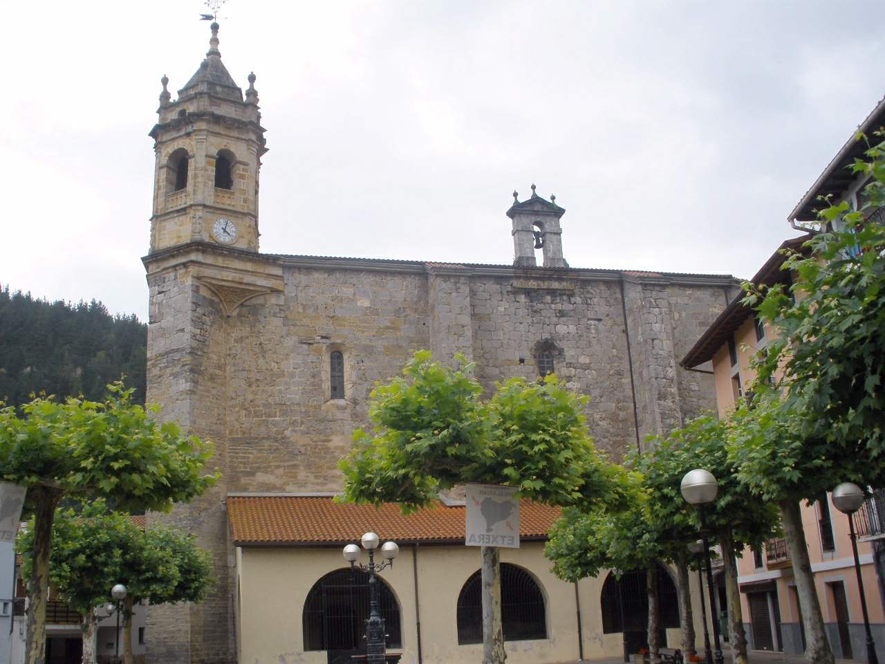 Iglesia de San Salvador (Legorreta)